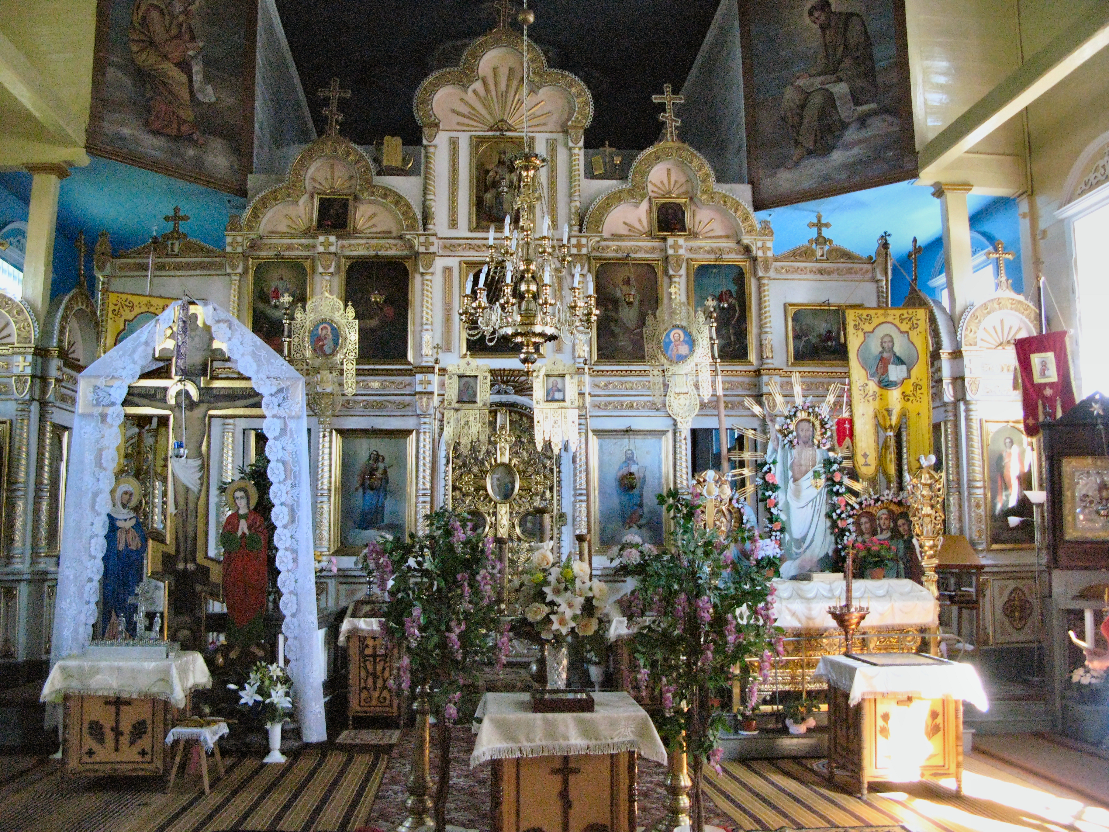 zespół cerkwi prawosławnej par. p.w. św. Michała Archanioła - Cerkiew prawosławna par. p.w. św. Michała Archanioła, drewn., 1864-1867 - cmentarz Trześcianka, Narew 03.1994.